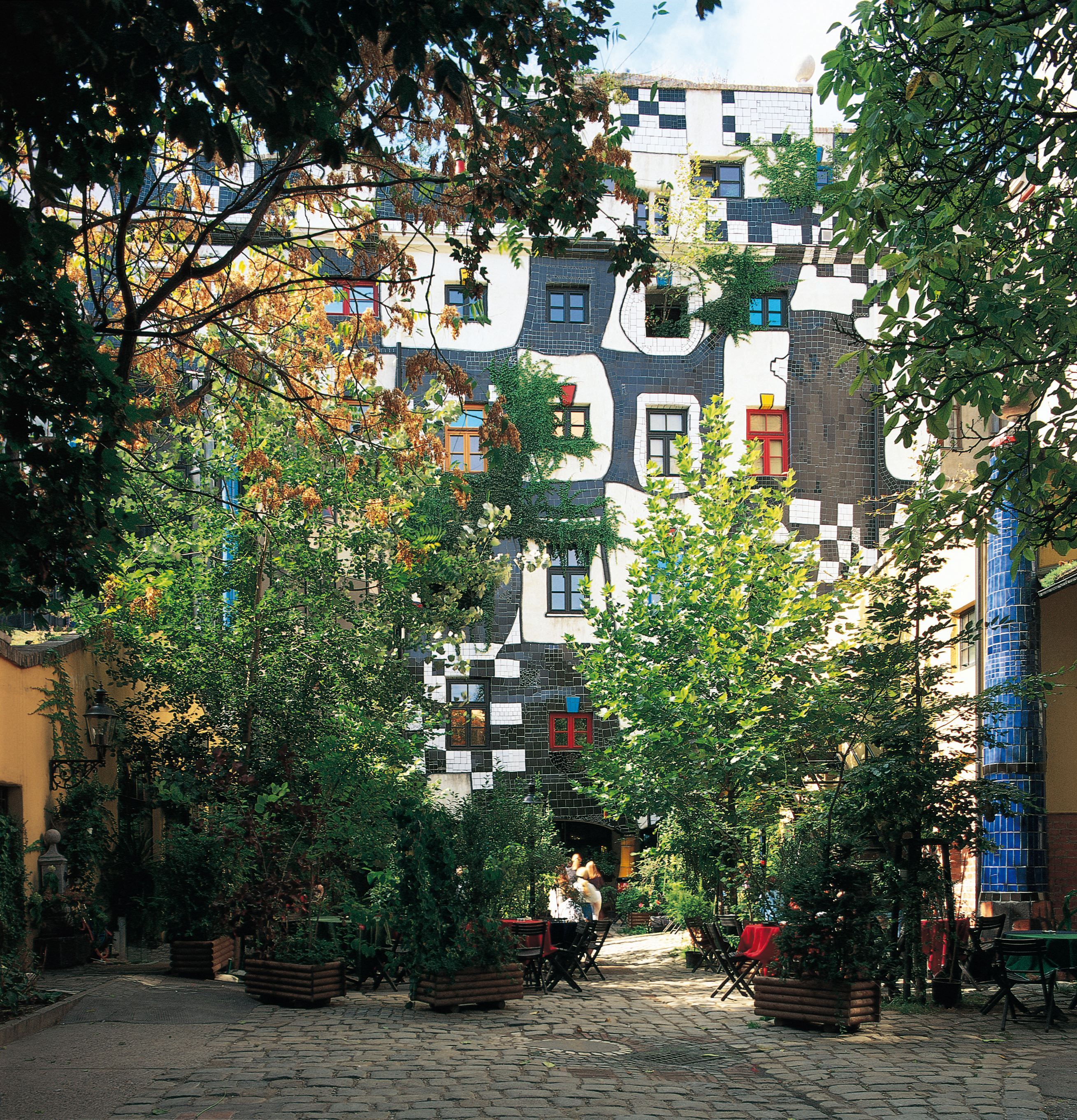 KunstHausWien